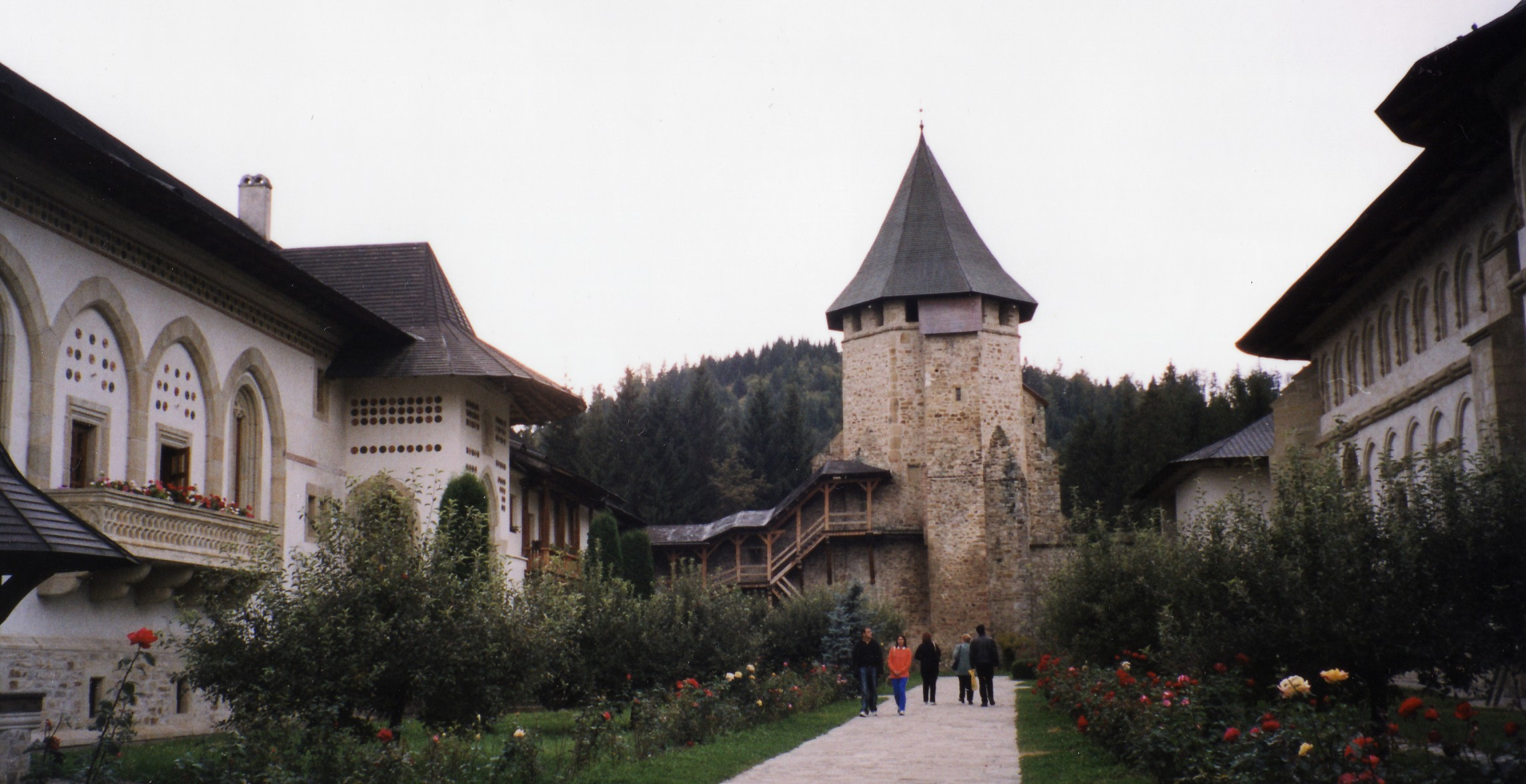 Putna, Románia: Kolostorudvar